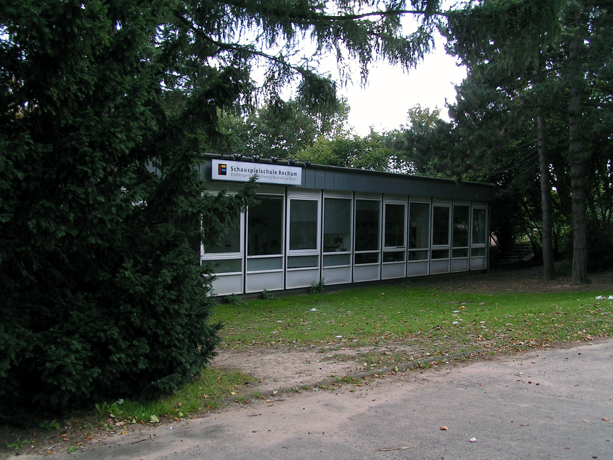 Schauspielschule Bochum am Lohring, Teil der Folkwang Hochschule im Ruhrgebiet Source: own work Date: Sept 2007, Bochum, Germany Author: Maschinenjunge Licence: GFDL, cc-by 3.0